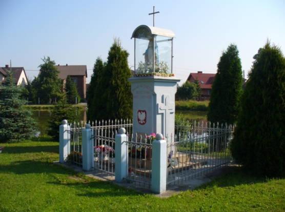 Ochodza (województwo małopolskie)